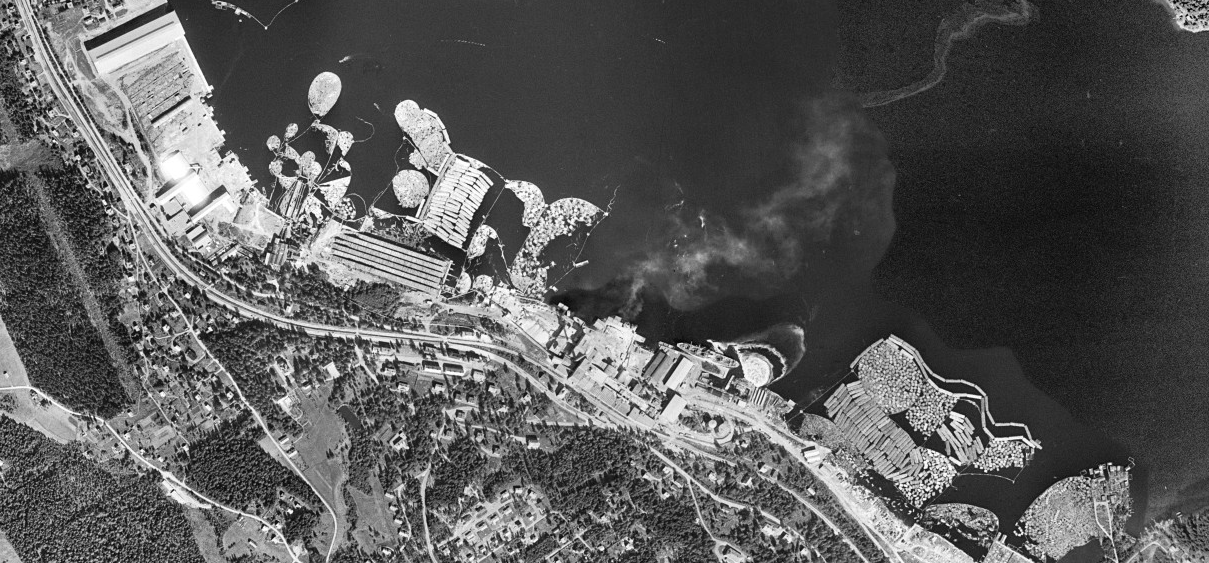 Historiska flygfoton från Lantmäteriet föreställandes Dynäs industrier.